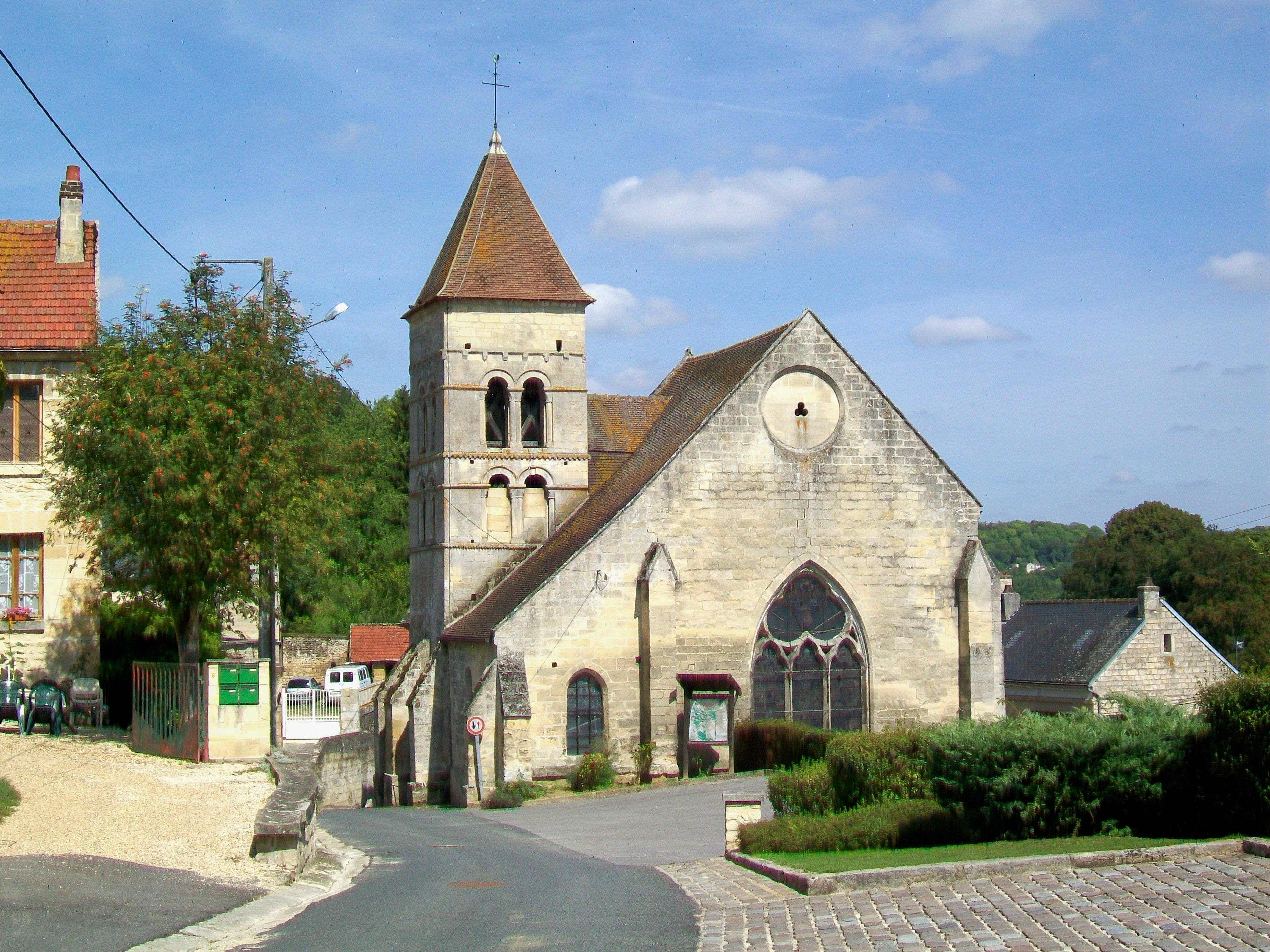 L'église Saint-Martin de Cramoisy, chevet et clocher roman ; vue depuis le sud-est.